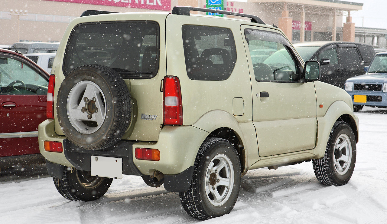 Suzuki Jimny Wide ( JB33 )